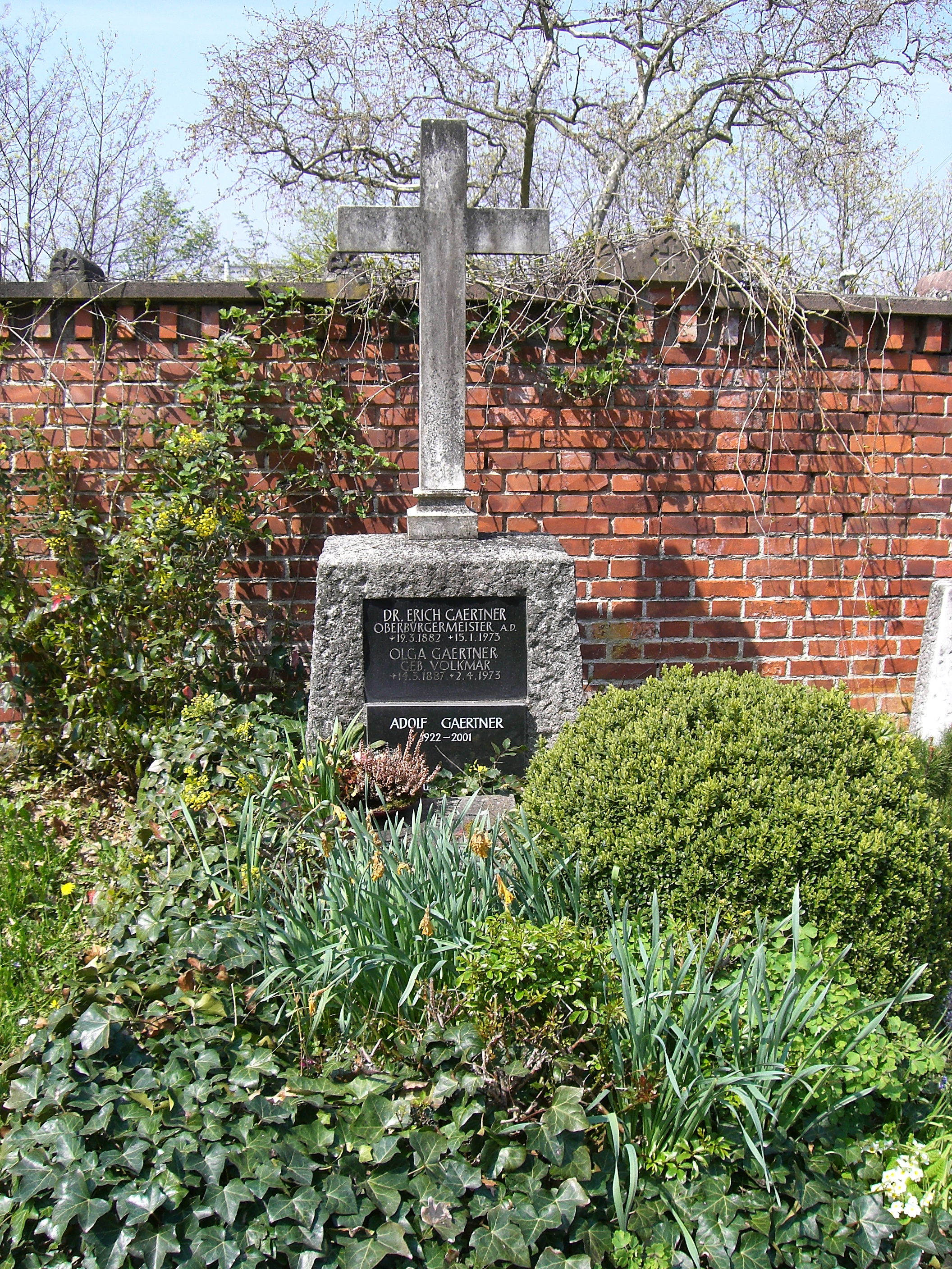 Dr. Erich Gärtner Oberbürgermeister (Osnabrück) 19.3.1882-15.1.1973